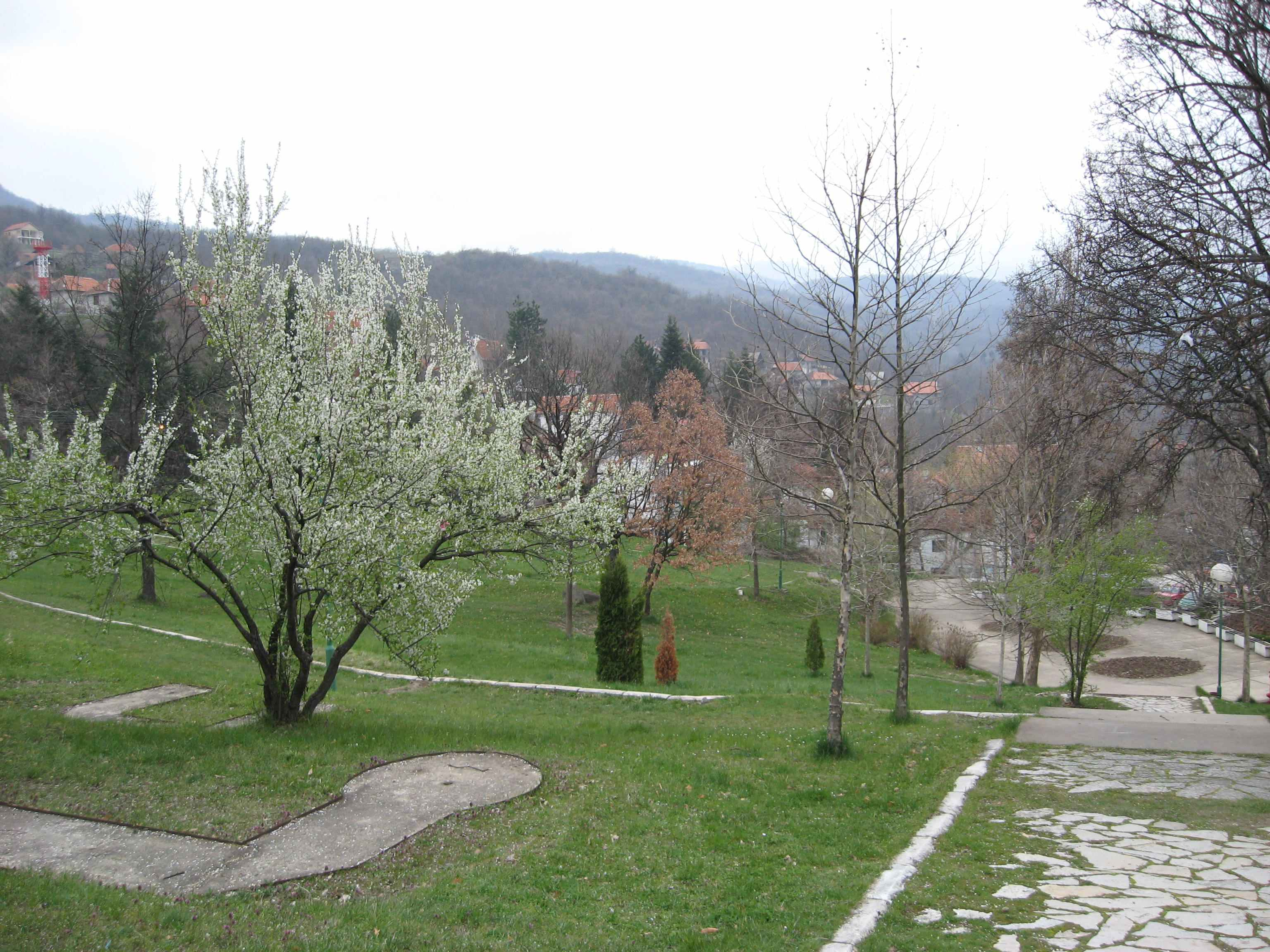 Hotel Radan's park at Prolom Spa, near Kuršumlija, Serbia/Le parc de l'hôtel Radan à Prolom Banja, près de Kuršumlija, Serbie